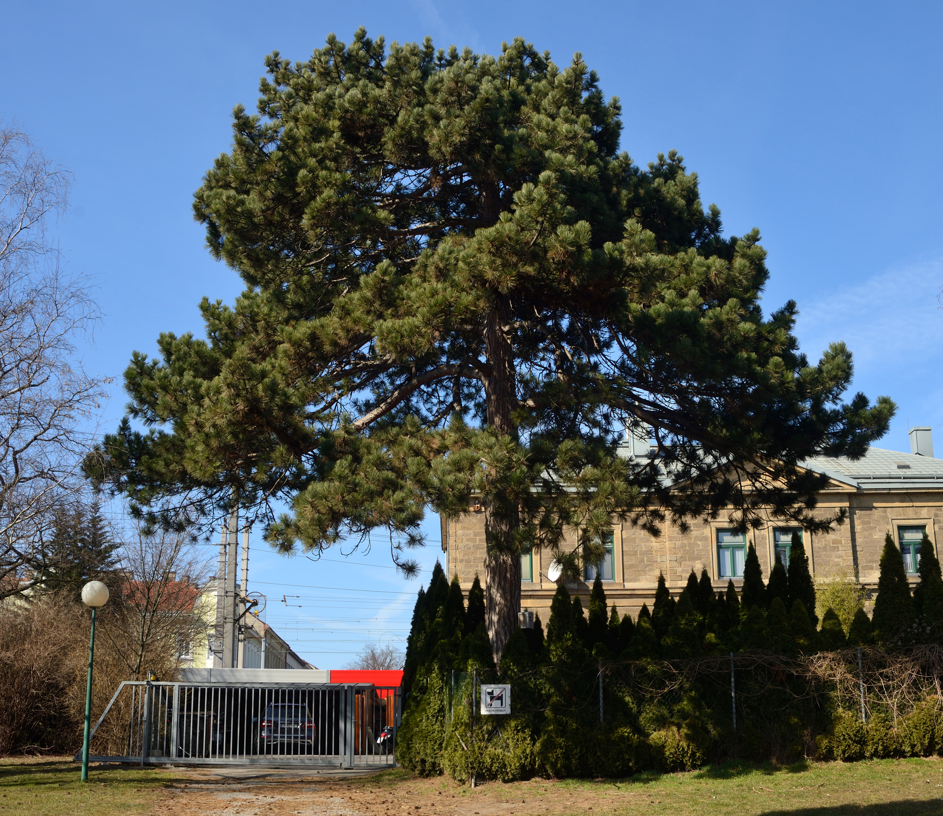 Schwarzkiefer (Pinus nigra) beim Mayer von Rosenau Park This media shows the natural monument in Vienna with the ID 583.